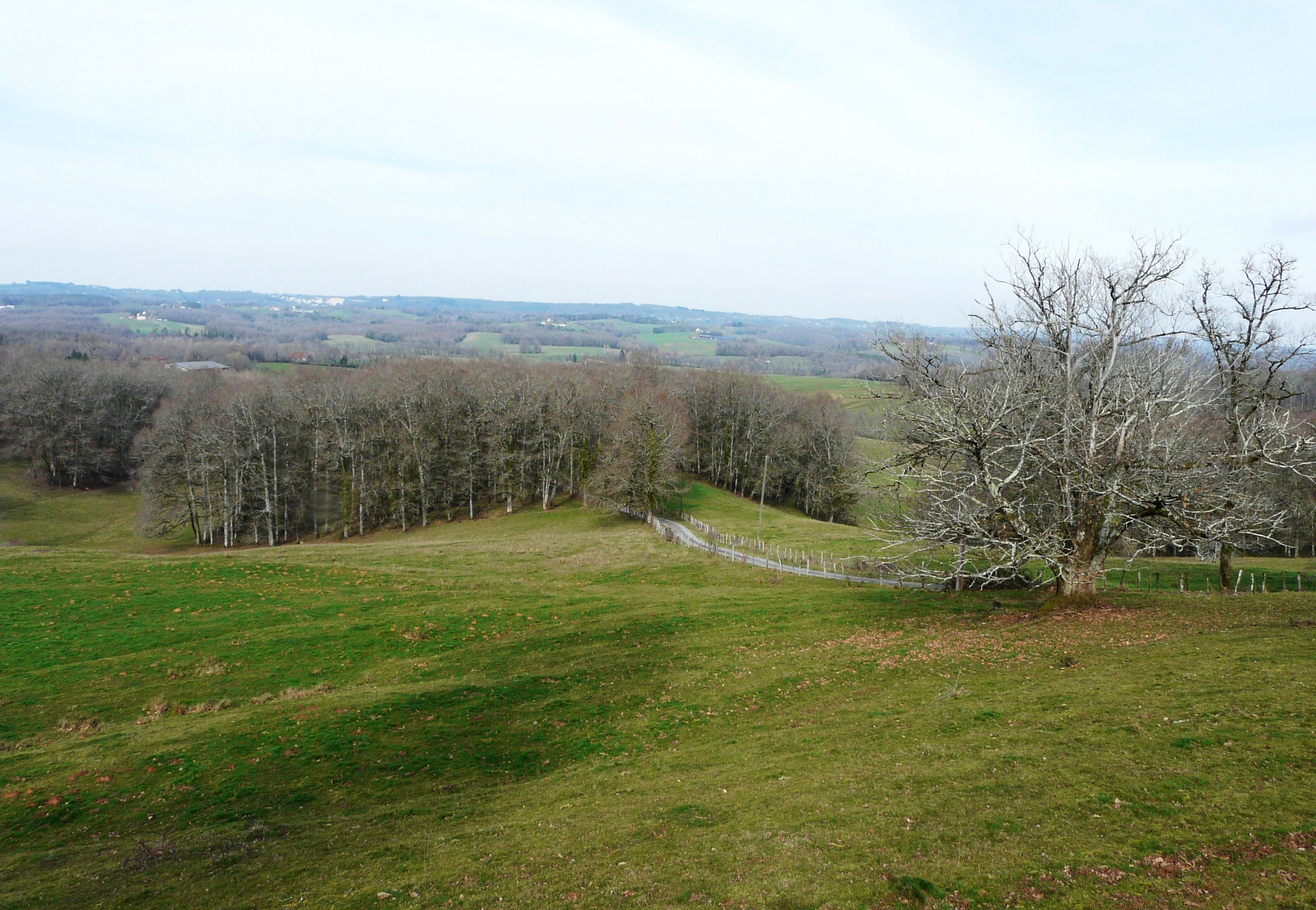 La vallée du Dalon vue depuis le bourg de Teillots, Dordogne, France.